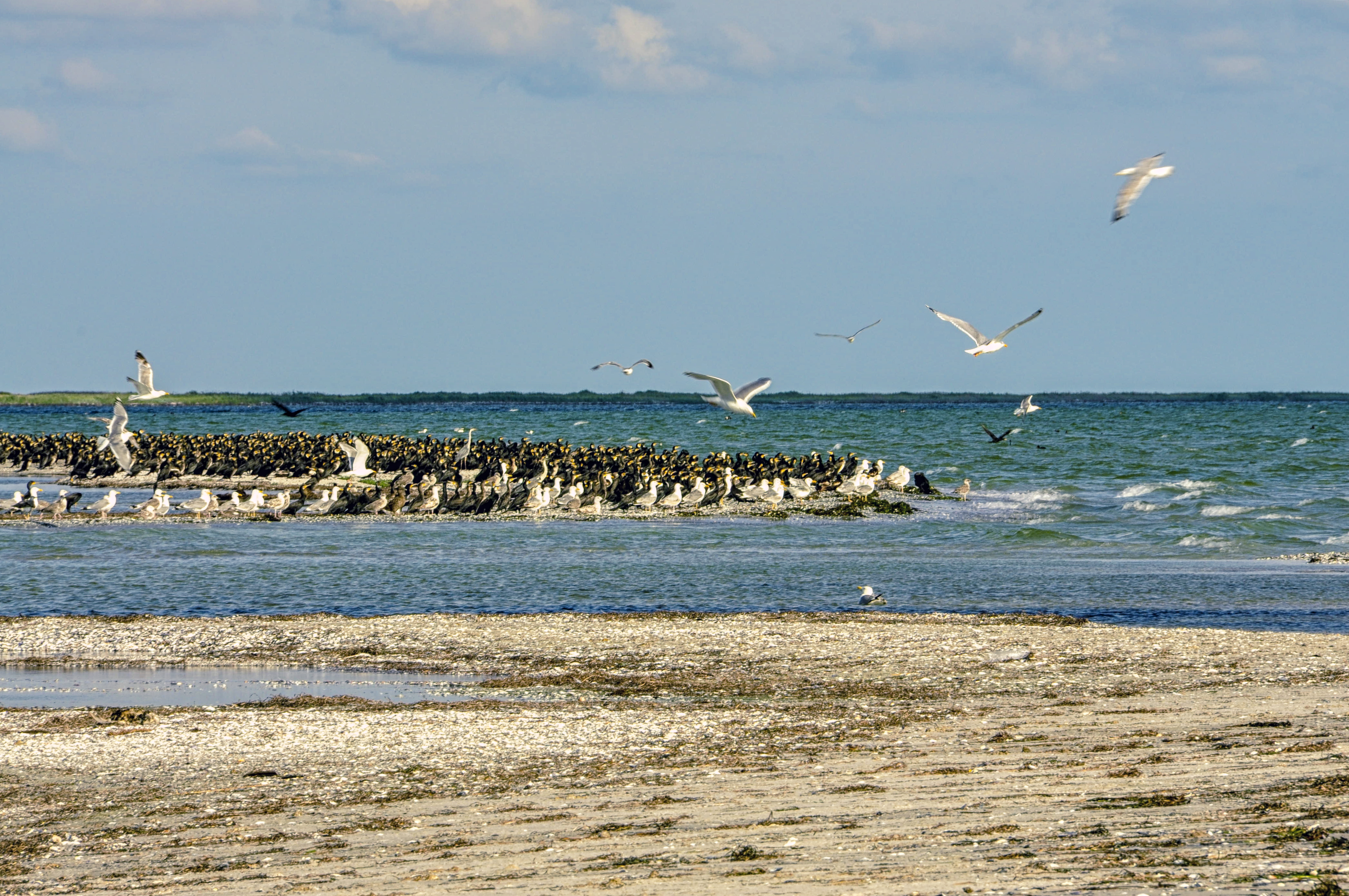 «Кінбурнська коса», Очаківський р-н